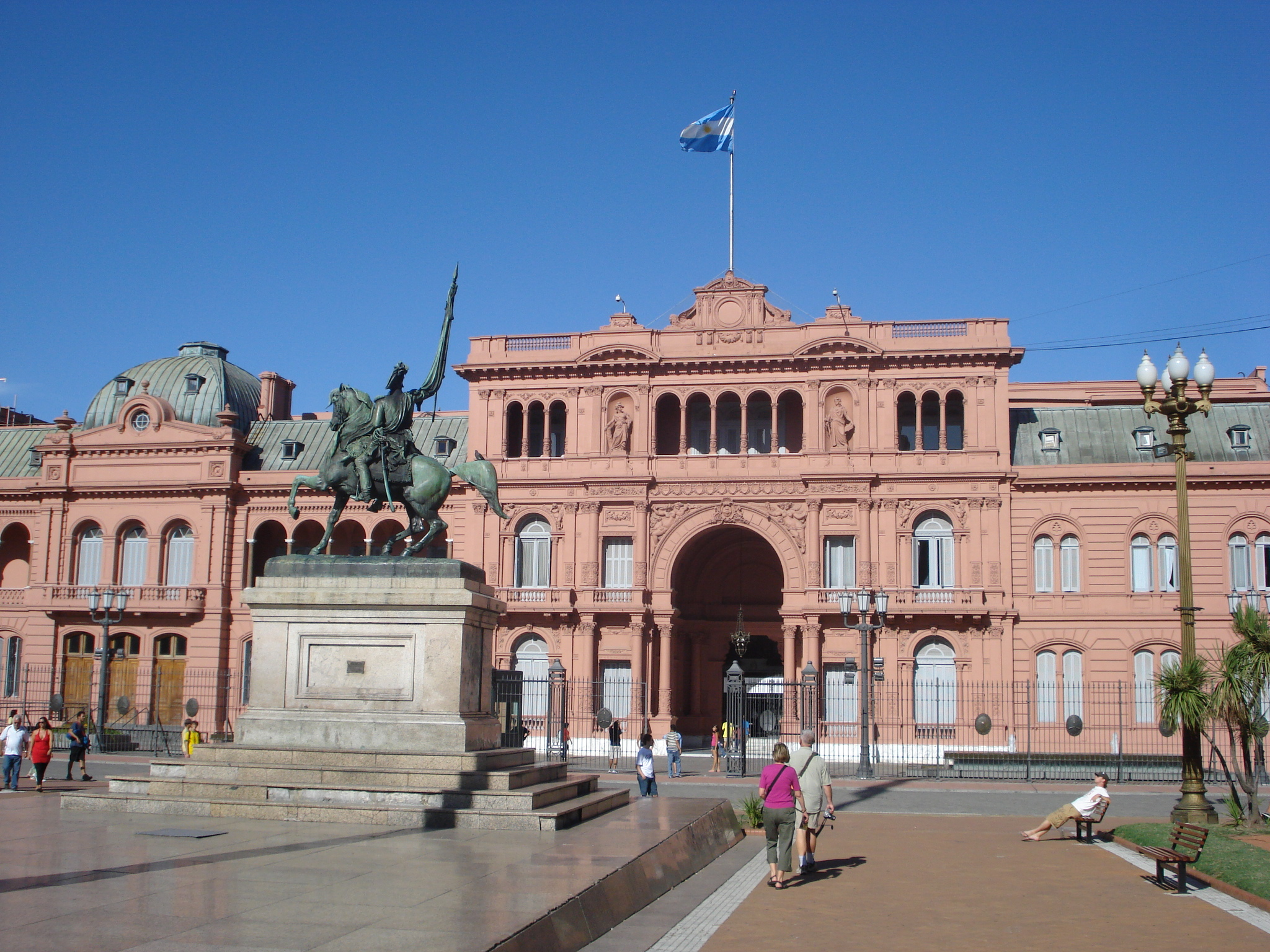 Каза розада у Б.Аиресу - председничка резиденција. фебруар 2009. Фотографисао Јакша П.